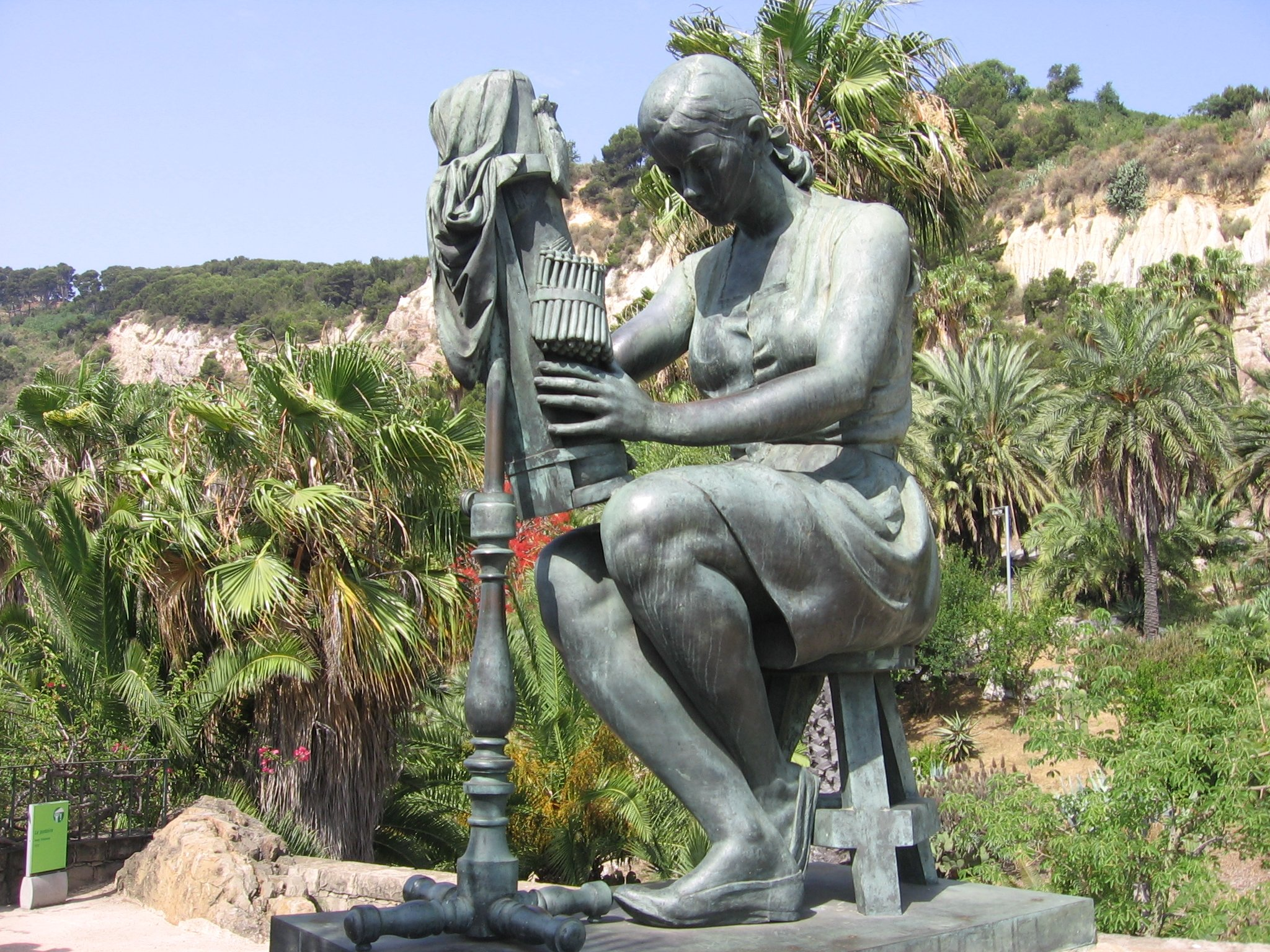 La puntaire, Josep Viladomat, 1972, Montjuïc (Barcelona).